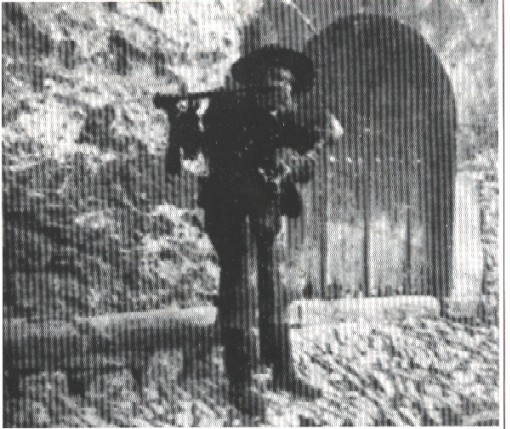 El tío Frescas, gaitero de Ventrosa (La Rioja) hacia 1920. Picture taken from